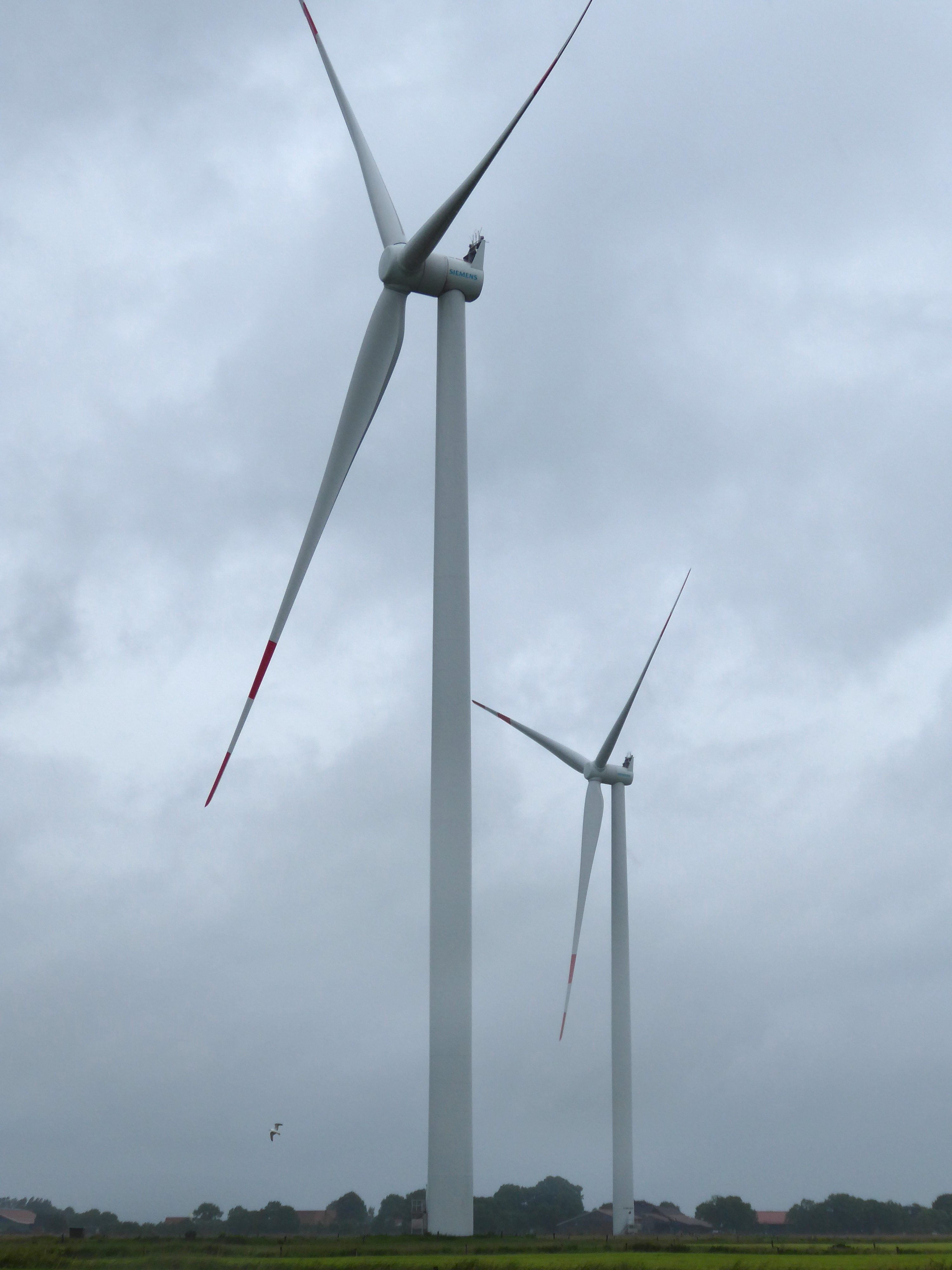 Zwei Siemens SWT-3.0-113 im Windpark Bassens, Wangerland